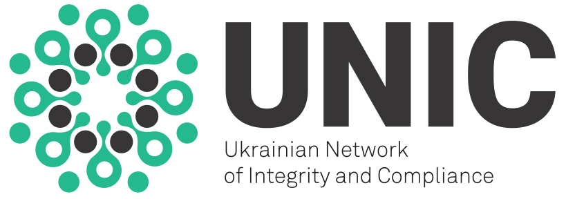 Logo of UNIC